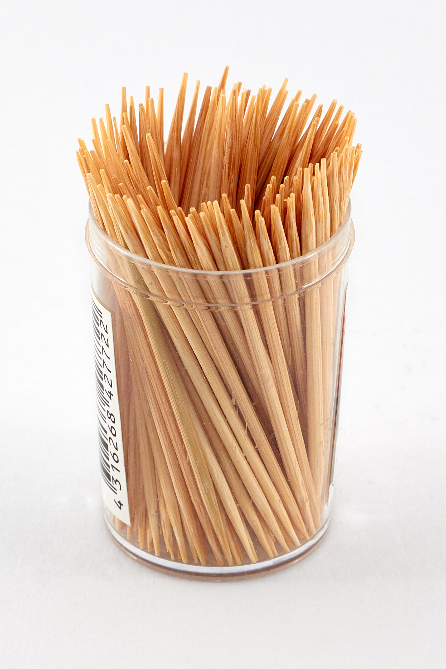 Holzzahnstocher